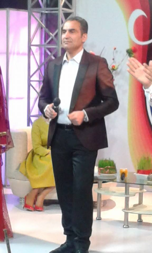 Asif İsaoğlu səhnədə